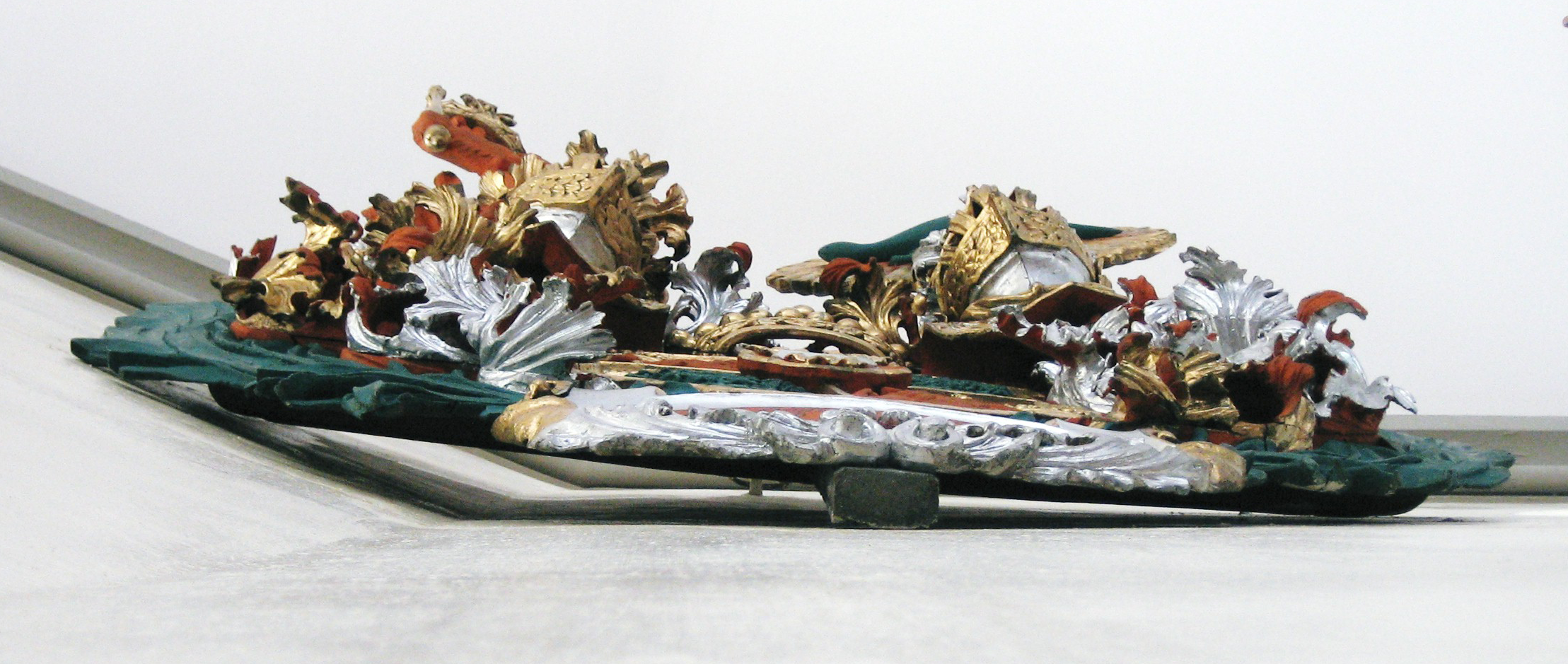 Huvudbaner för friherre Malcolm Hamilton af Hageby (1635–1699). Christinae kyrka (Tyska kyrkan), Göteborg. Huvudbaneret ses här underifrån. Den stång, numera avsågad, som användes då vapnet bars i begravningståget syns tydligt på baksidan.